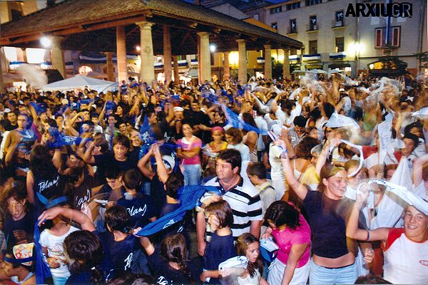 Assitents al repte de la Festa Major de Granollers, que dona el tret de sortida a la competició entre colles. Toni Torrillas i Gumara 2004 Arxiu Muncipal de Granollers